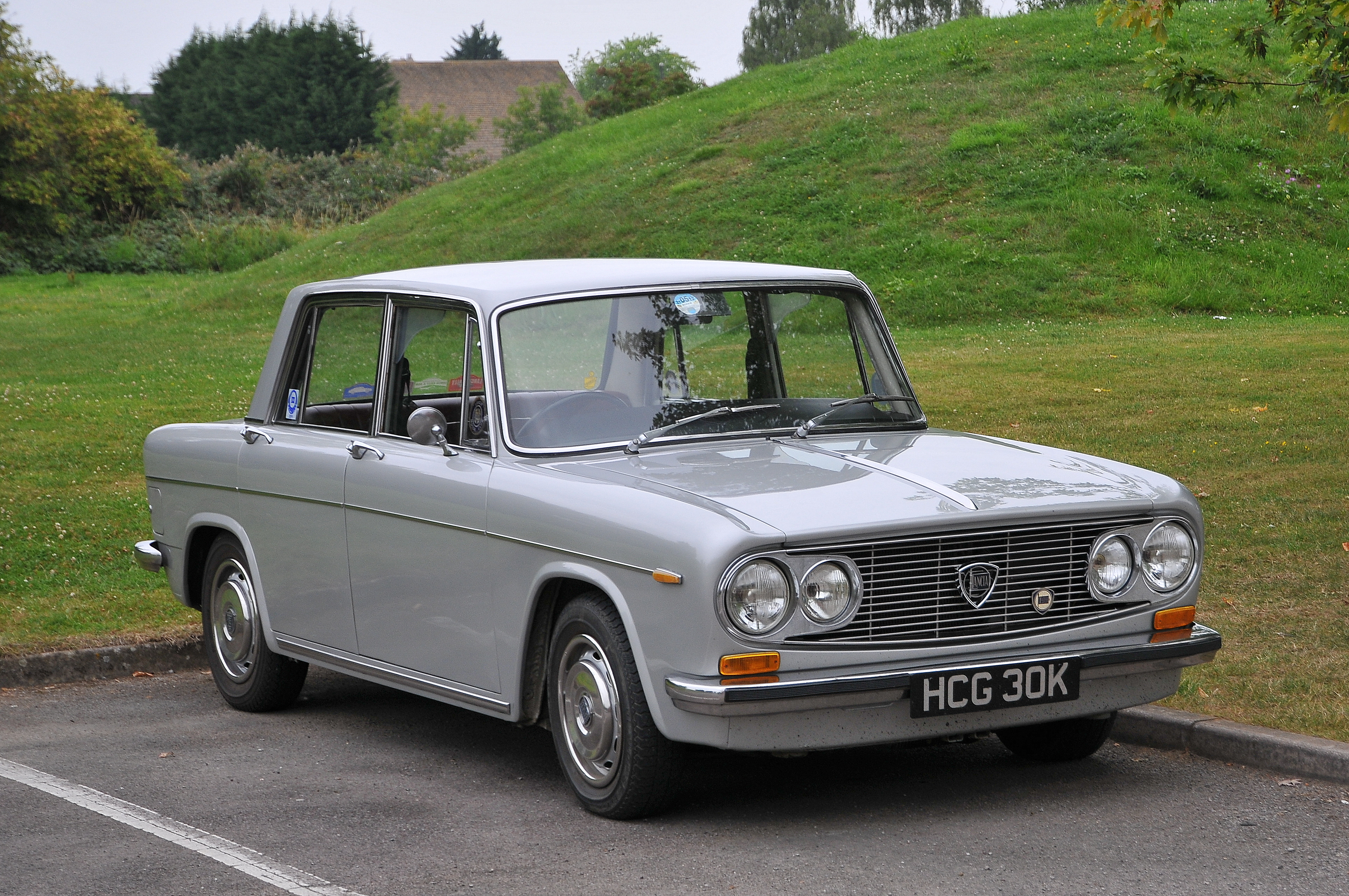 Lancia Fulvia Berlina. Lancia Motor Club AGM 2011